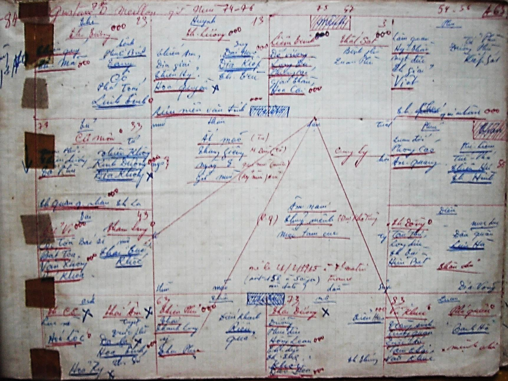 G D Meillon2